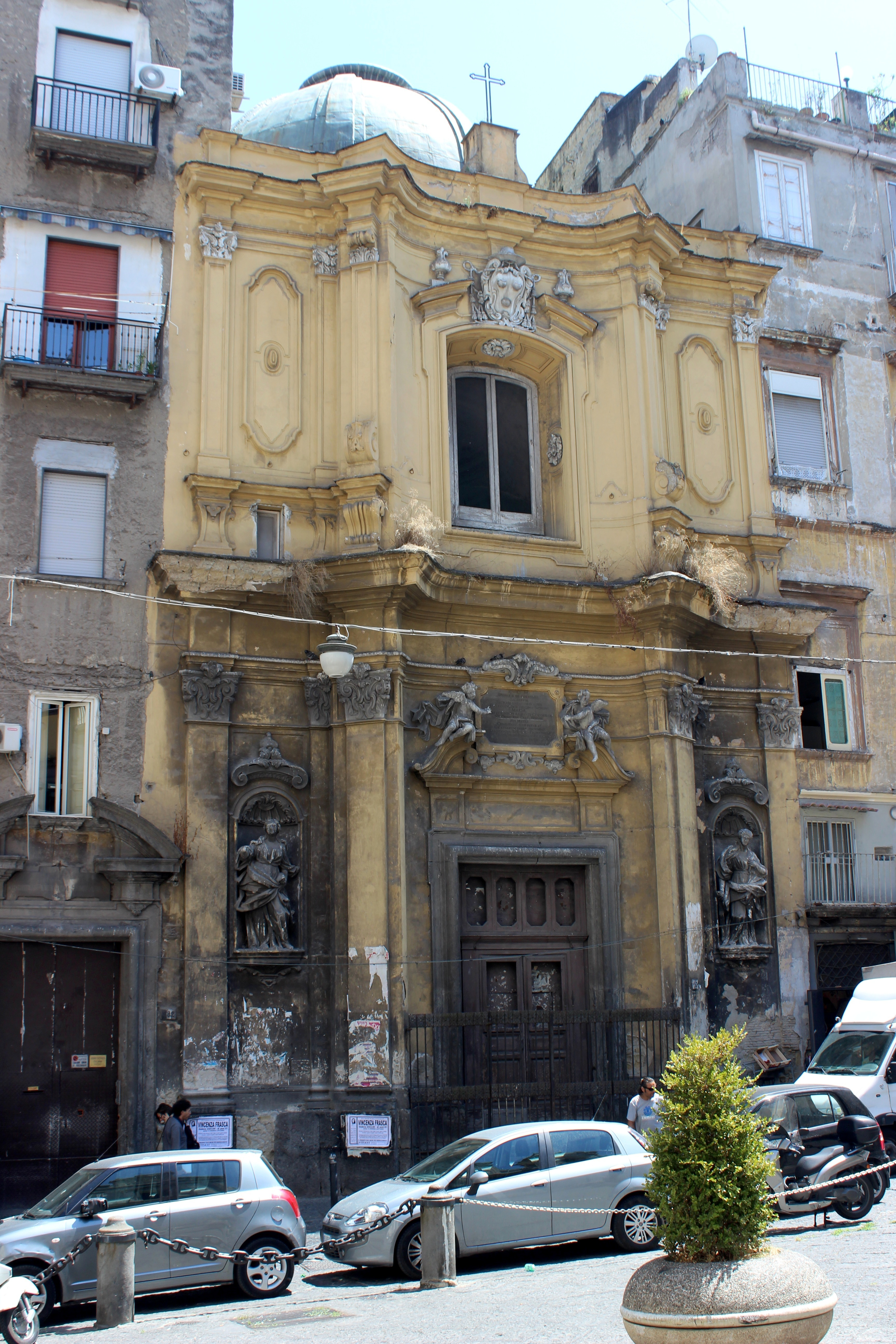 Nápoles. Iglesia de Santa Maria La Colonna.